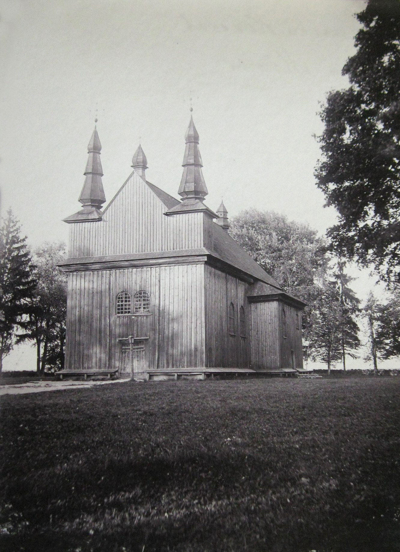 Беларуская (тарашкевіца): Камень (Kamień). Касьцёл